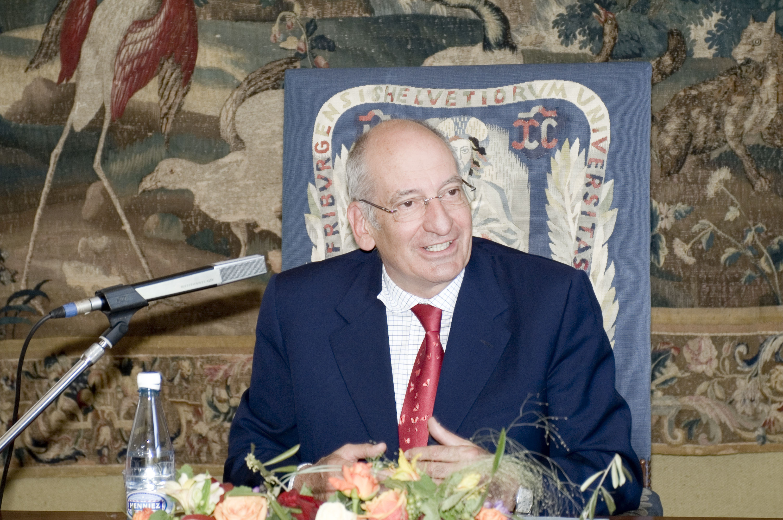 Le Conseiller fédéral suisse Pascal Couchepin.